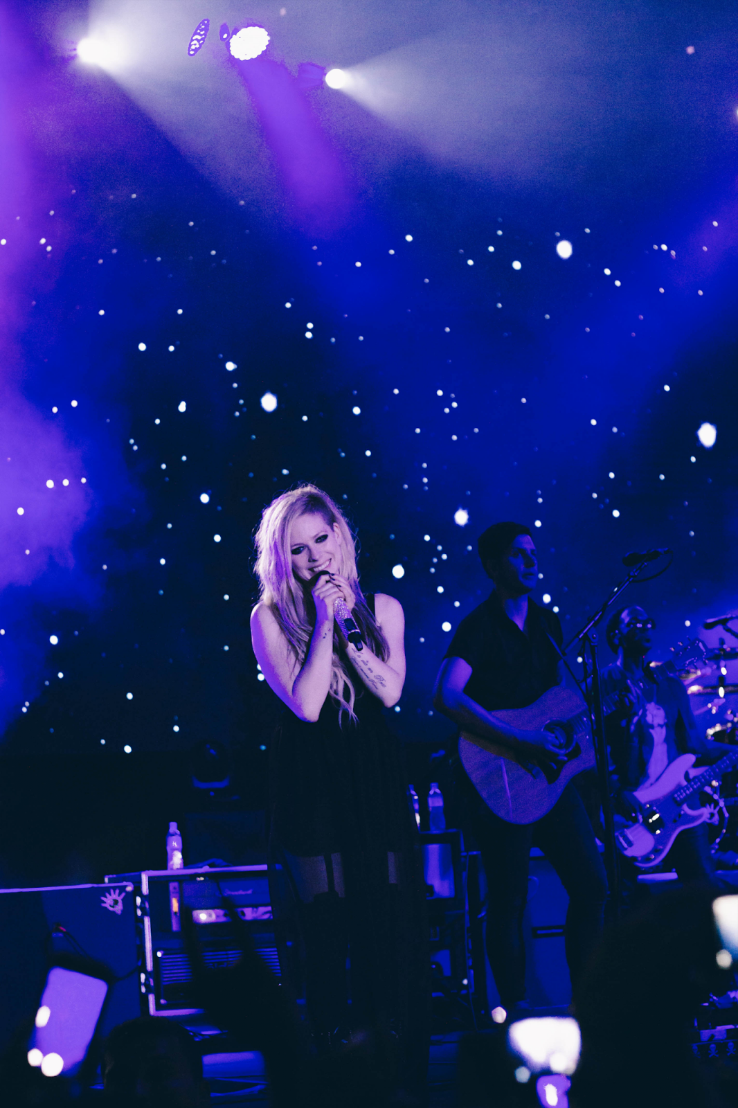 Avril Lavigne in Brasilia, Brazil in The Avril Lavigne Tour